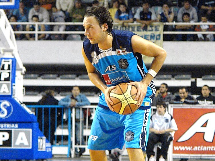 Peñarol's point guard Tato Rodríguez, at a match